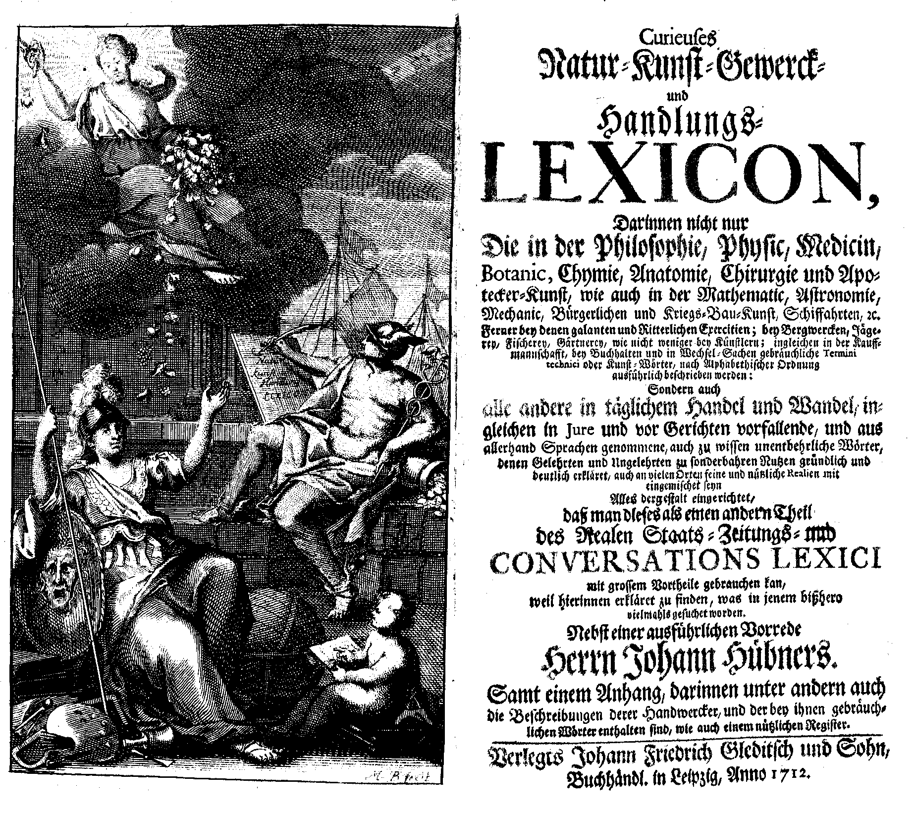 Curieuses Natur-Kunst-Gewerck- und Handlungs-Lexicon (1712)